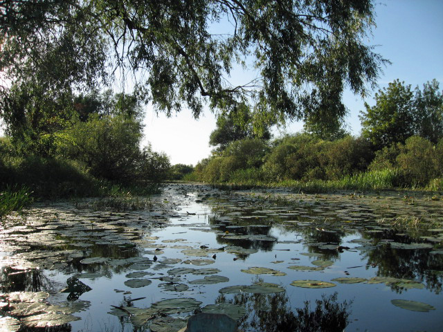 Глушиця: с. Пересипки, Путивльський район, Сумщина